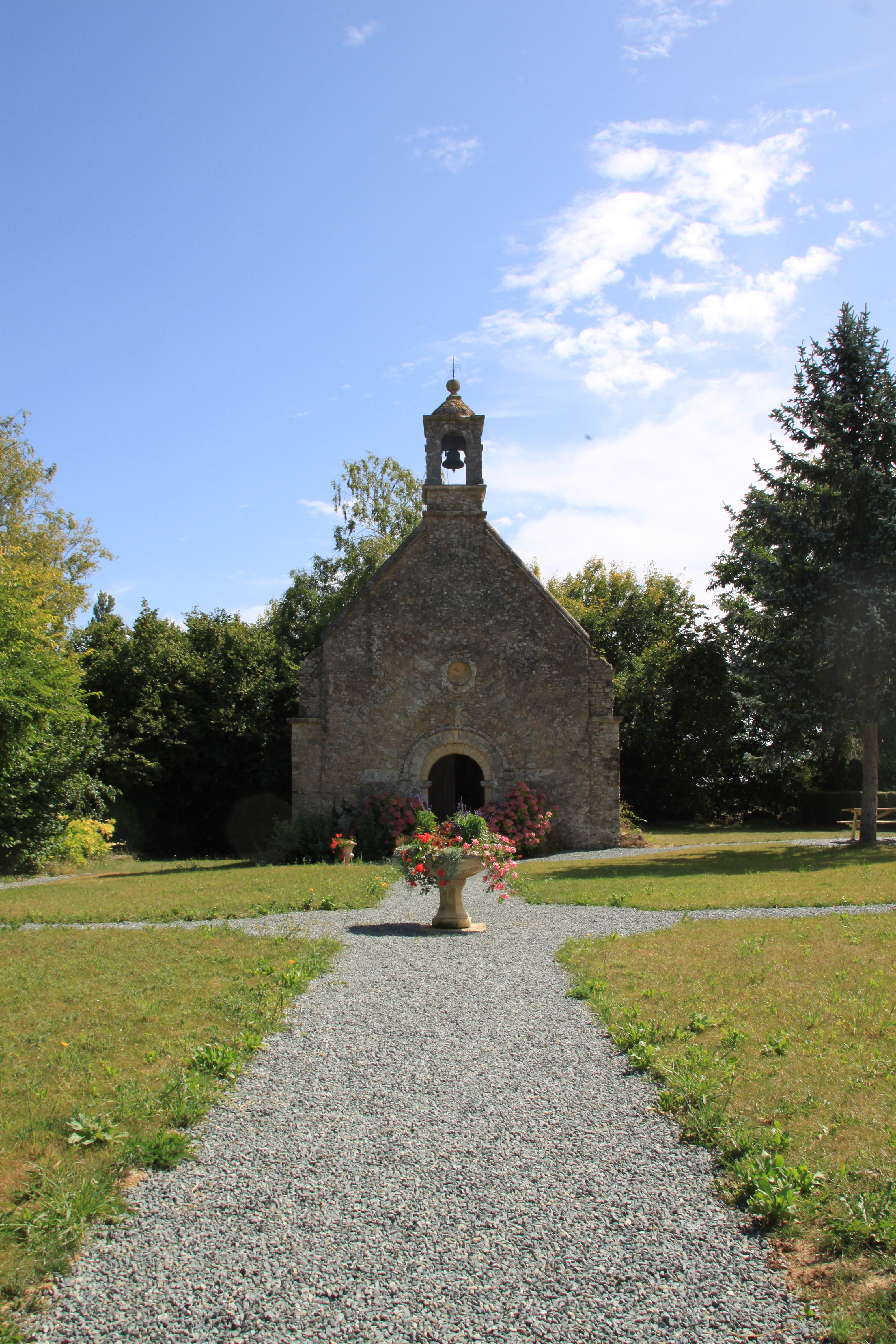 Au premier plan les parterres de la chapelle, au second plan, l'entrée de l'édifice.